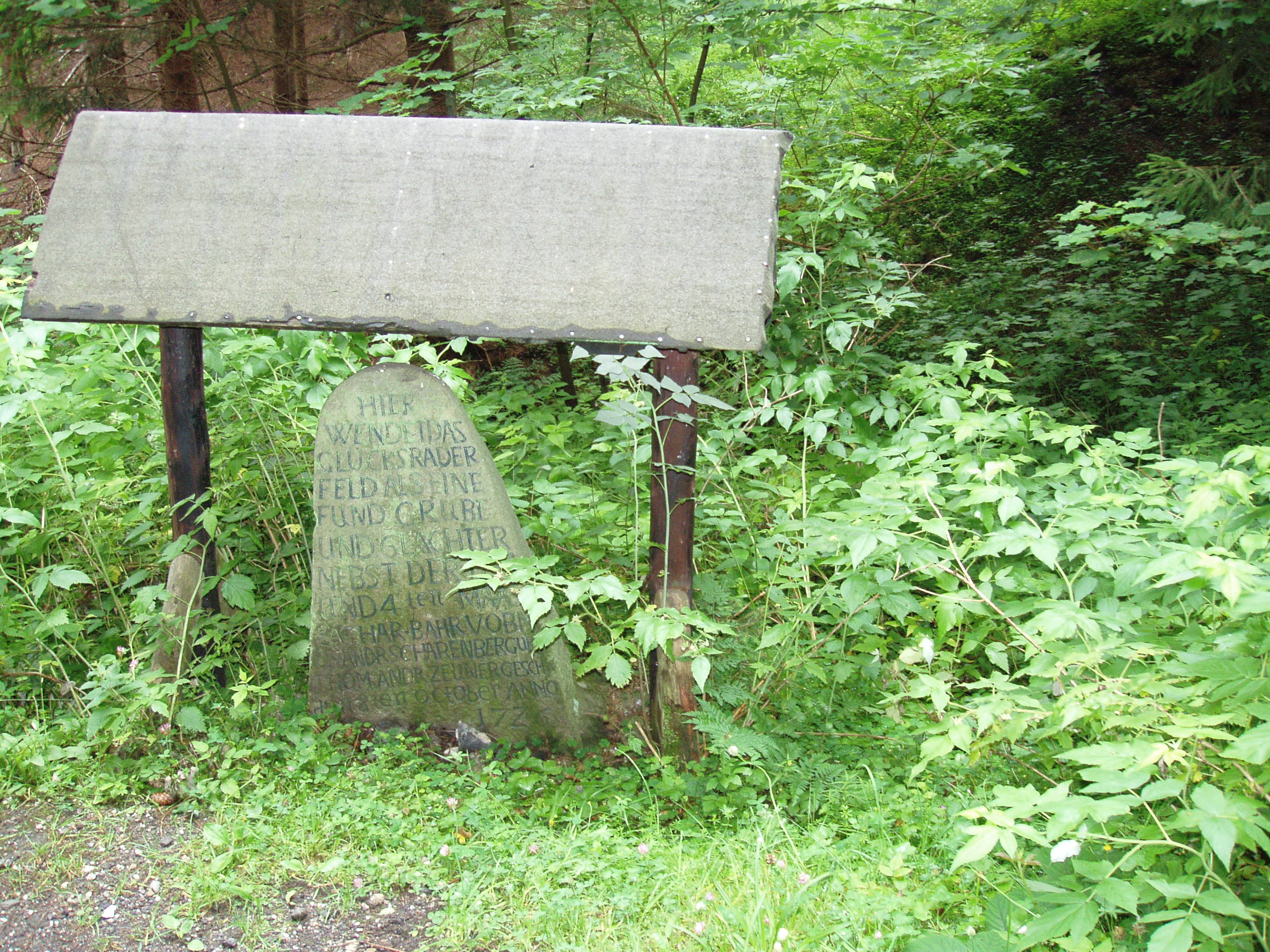 Lochstein der Grube Glücksrad bei Schulenberg im Harz